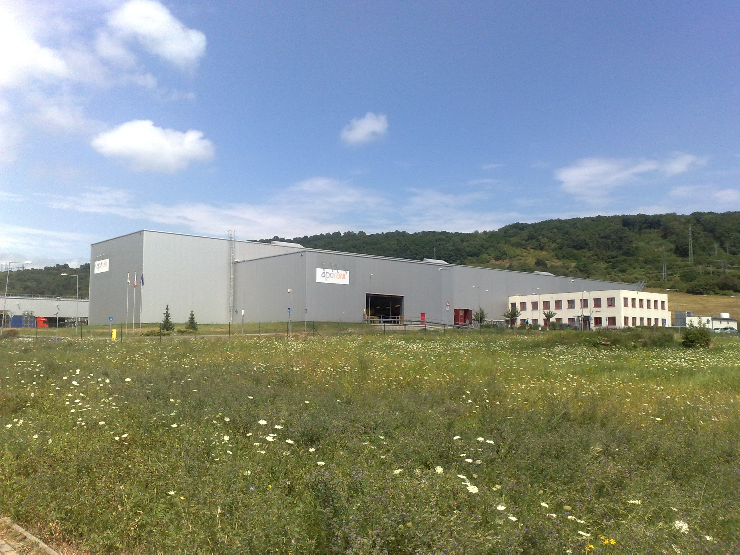 Ústecké Předlice, chudinská, cikánská čtvrť.